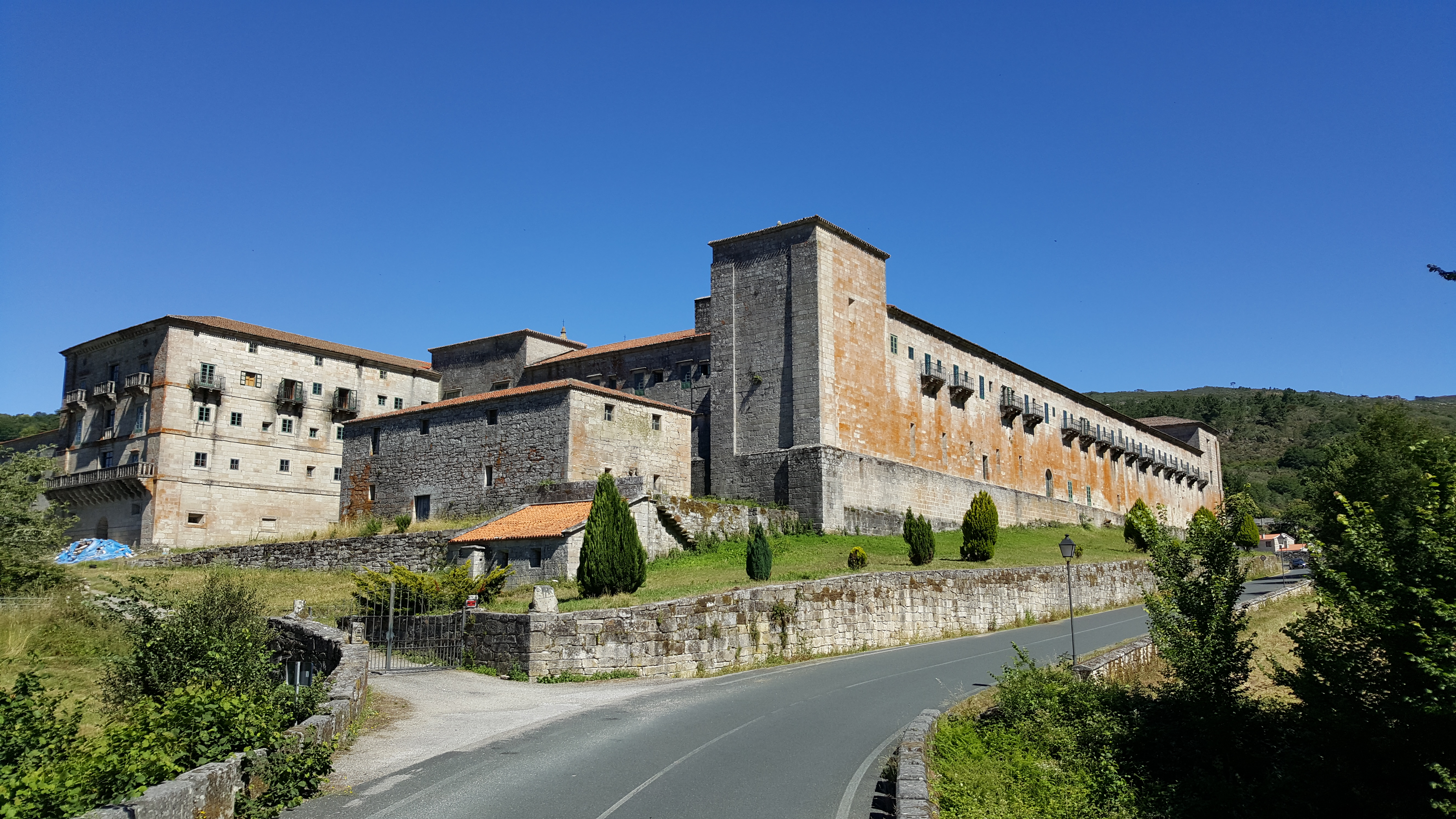 Vista sur do Mosteiro de Oseira